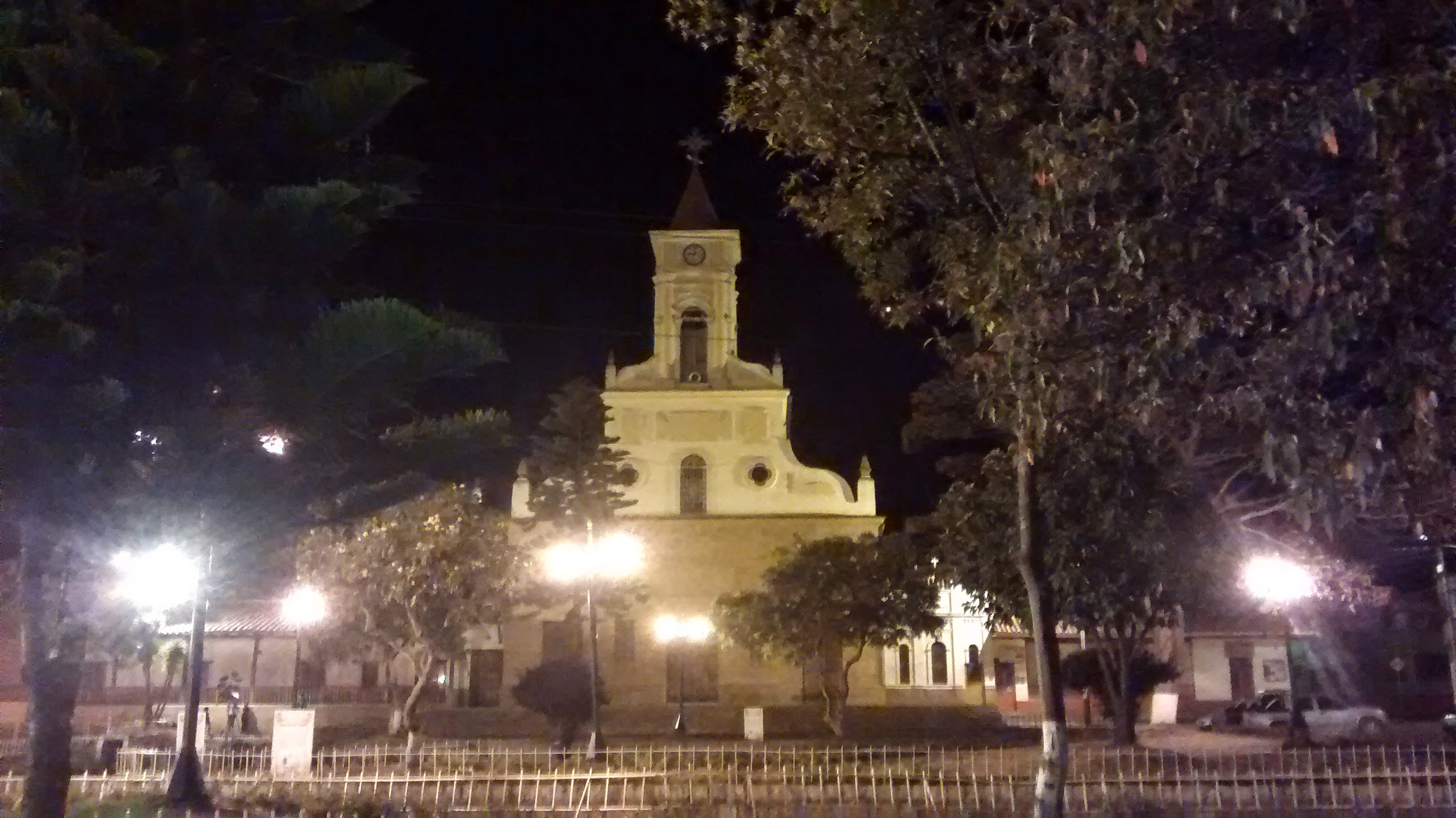 Parque principal Guachetá (cund) Vista Nocturna